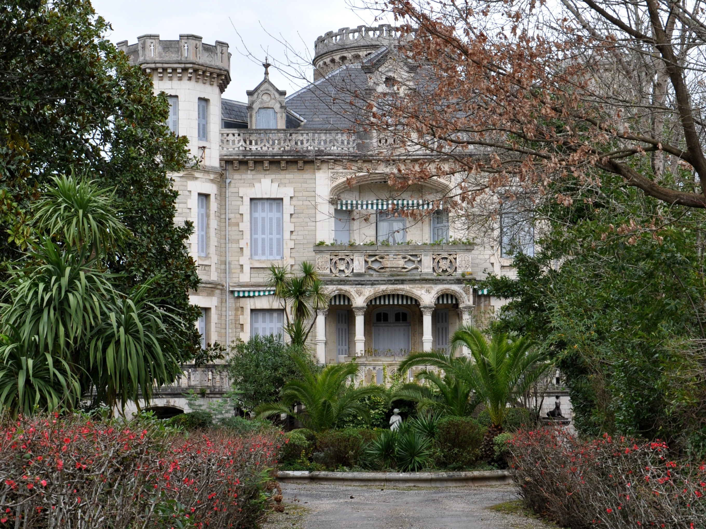 villa sofia - ANGLET